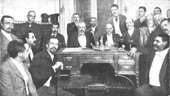 Nuevo Círculo Romerista: El señor Romero Robledo, el general Borrero y varios amigos la noche de la inauguración. Fotografía de Manuel Compañy.